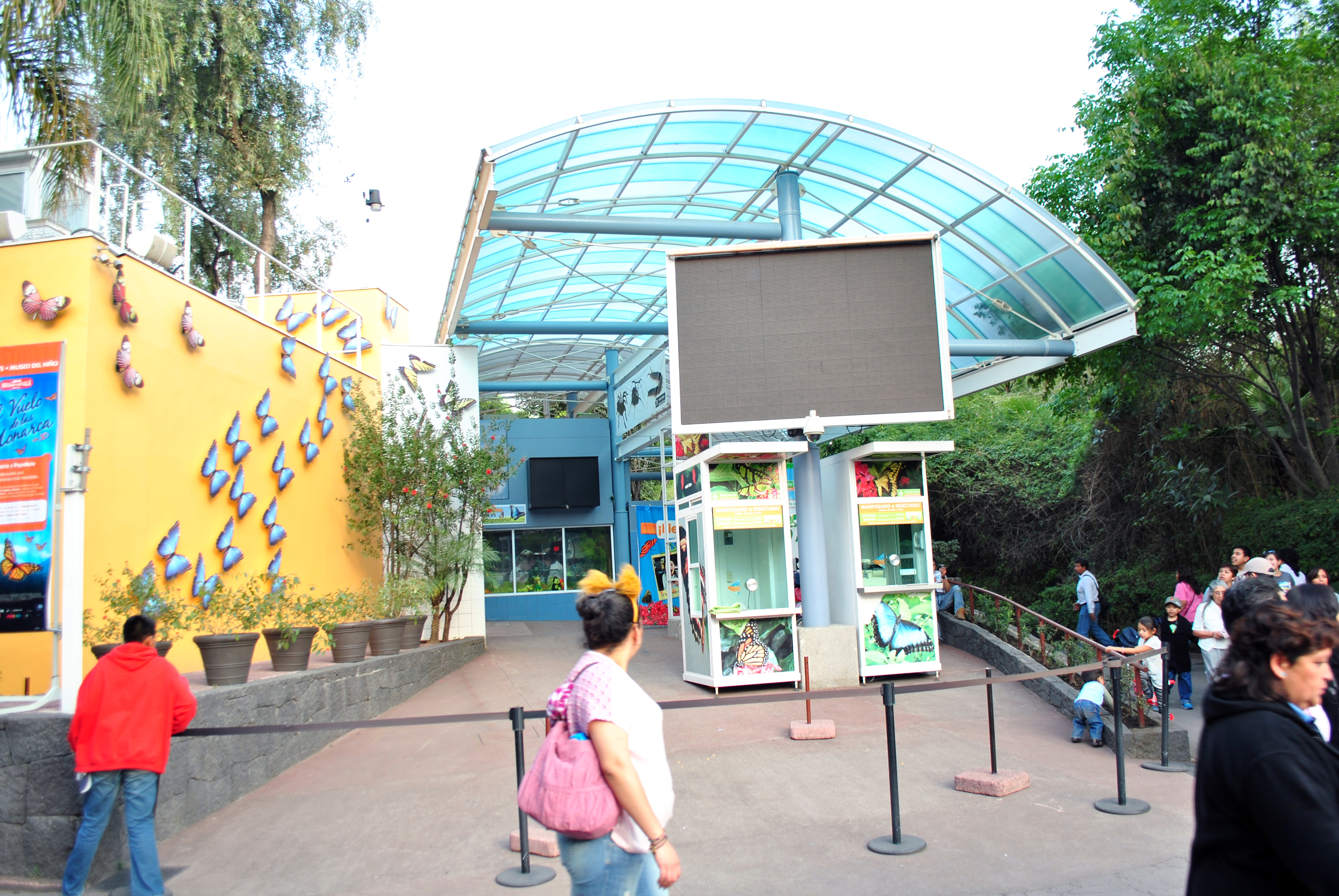 Bosque de Chapultepec primera sección